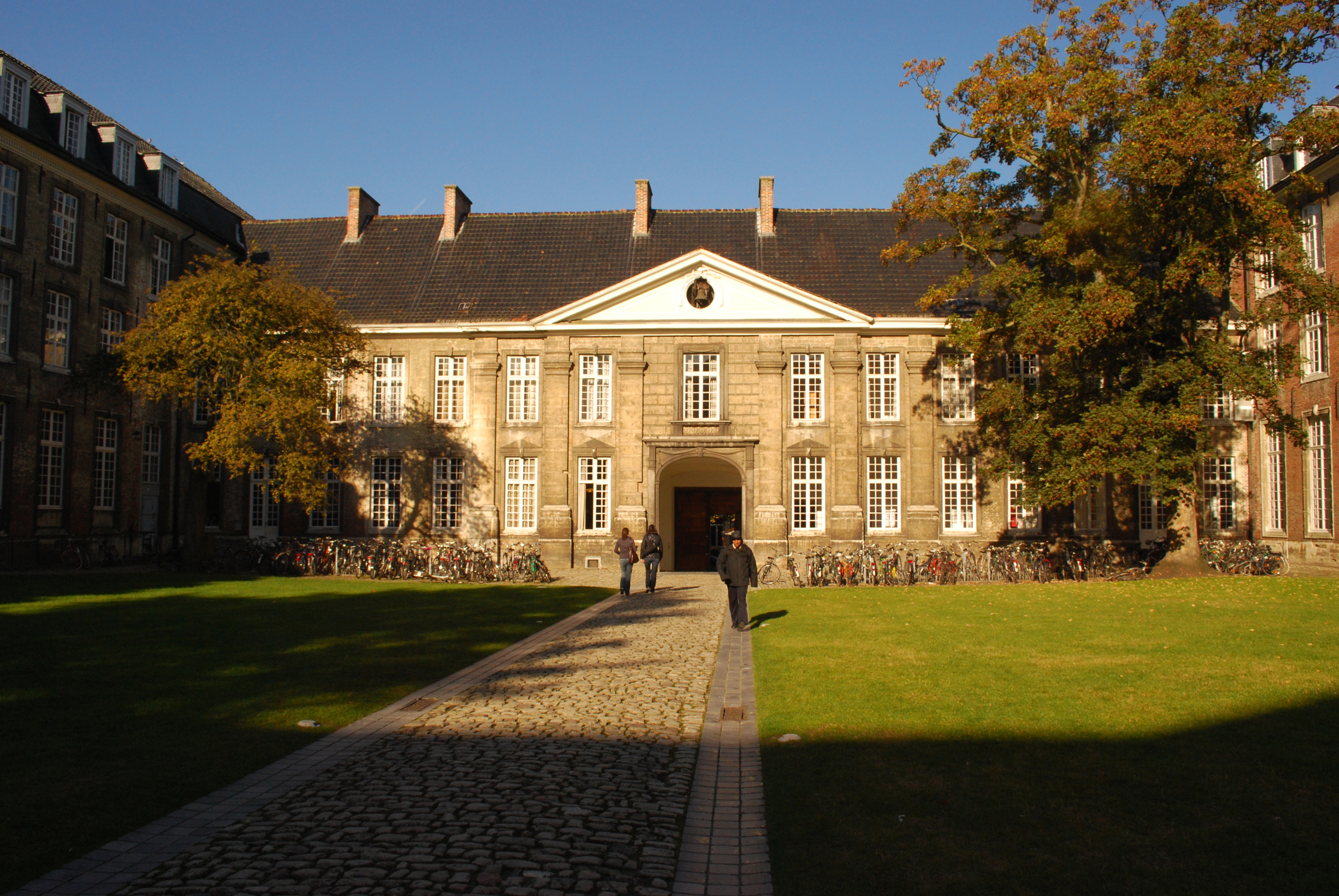 Leuven : Collège du Pape.